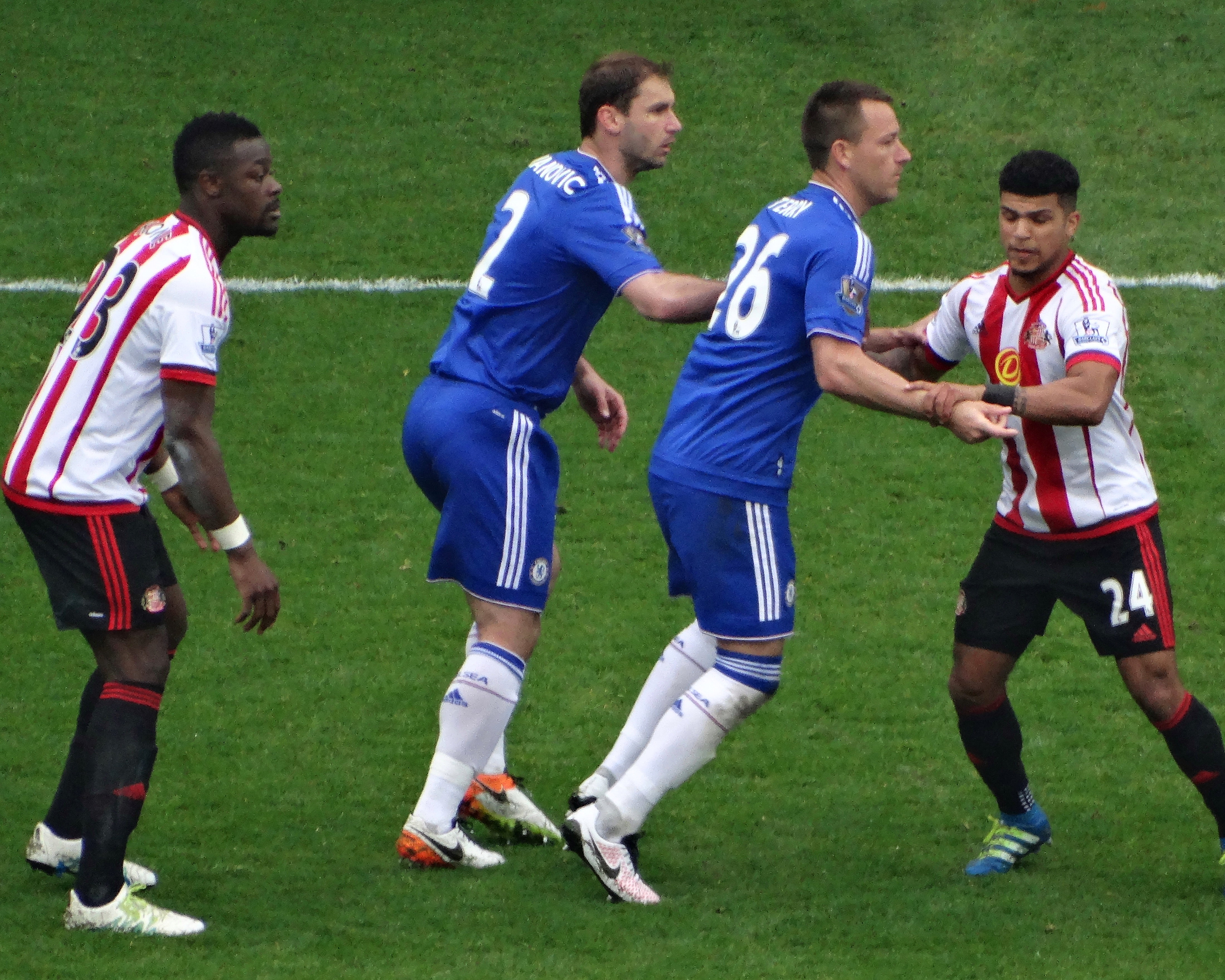 Sunderland 3 Chelsea2